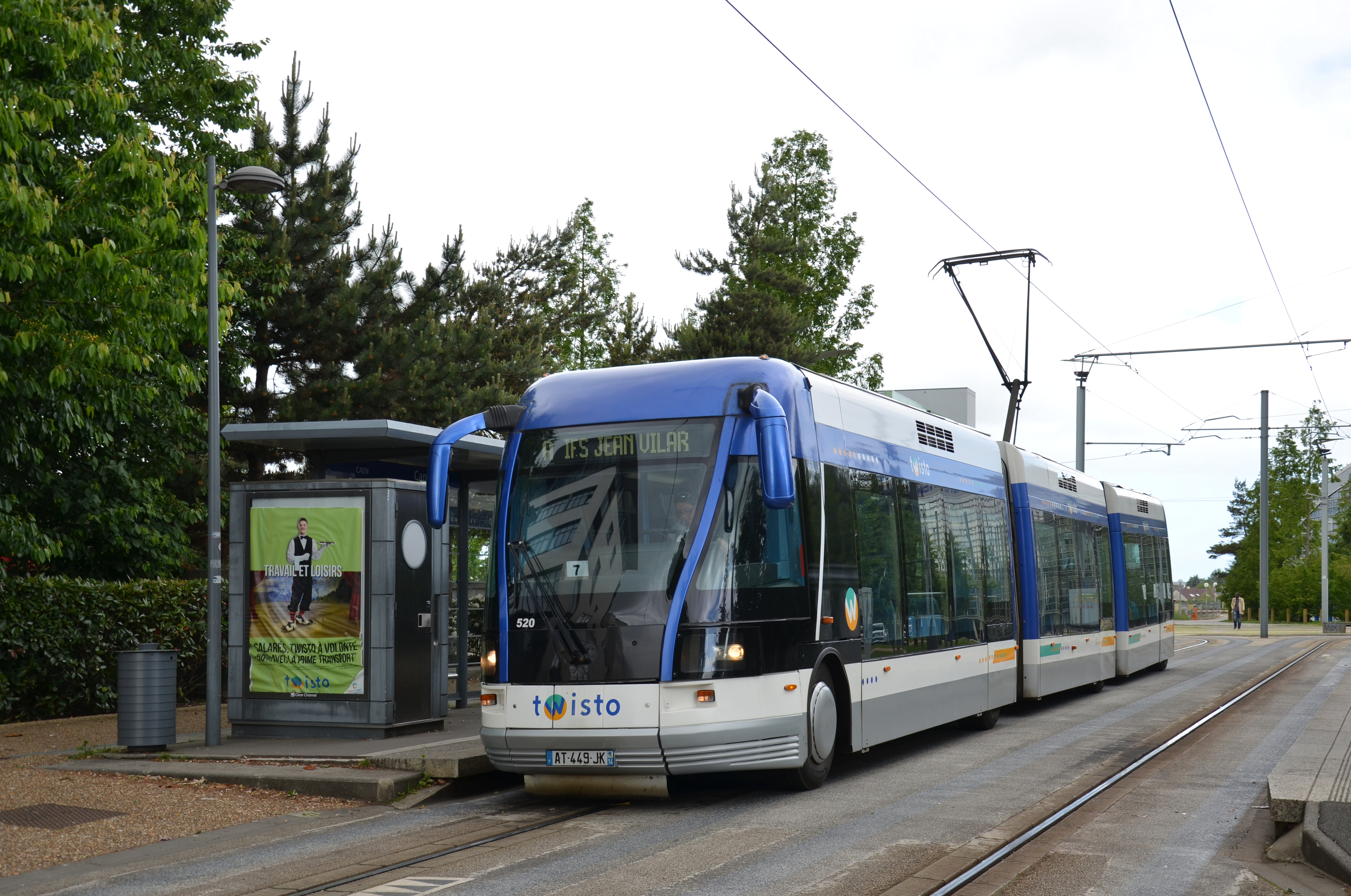 Bombardier TVR n°520 sur la ligne A du réseau Twisto de Caen, en attente du départ à la station Campus 2.